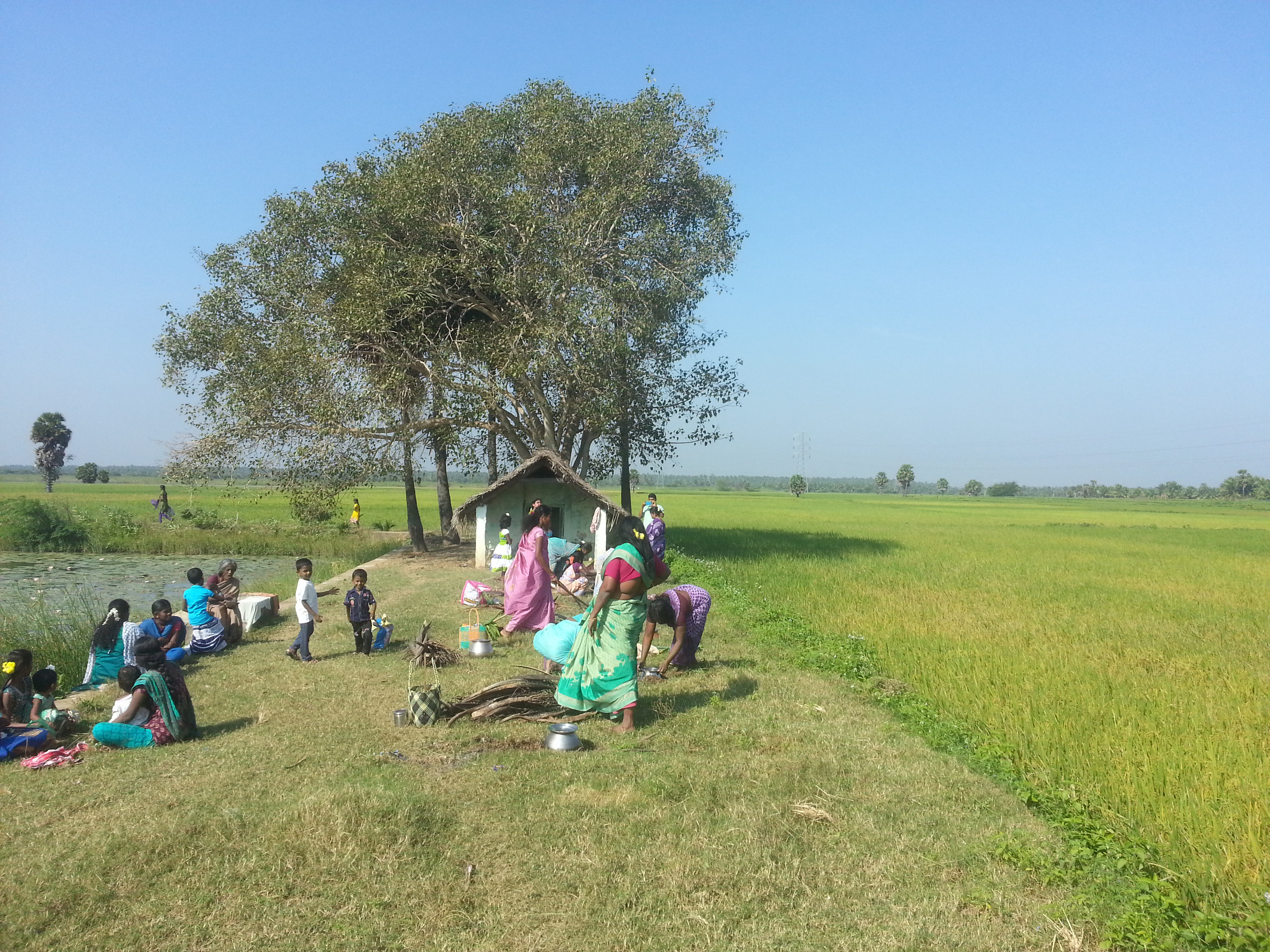 முடச்சிக்காடு அருள்மிகு சிவலிங்க சித்தி விநாயகர் கோயில், முடச்சிக்காடு